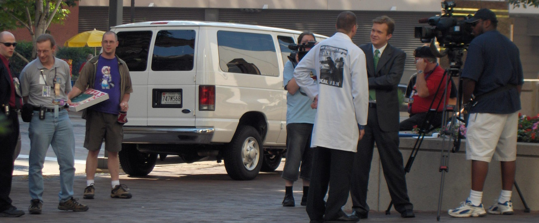 MediaAttention